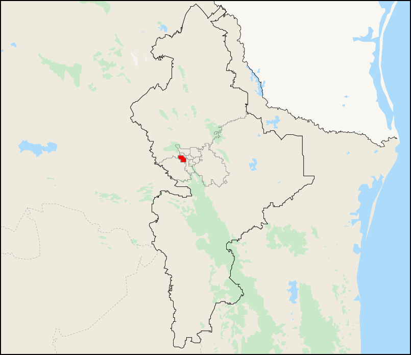 Mapa del distrito electoral federal 6 ubicado en Nuevo León